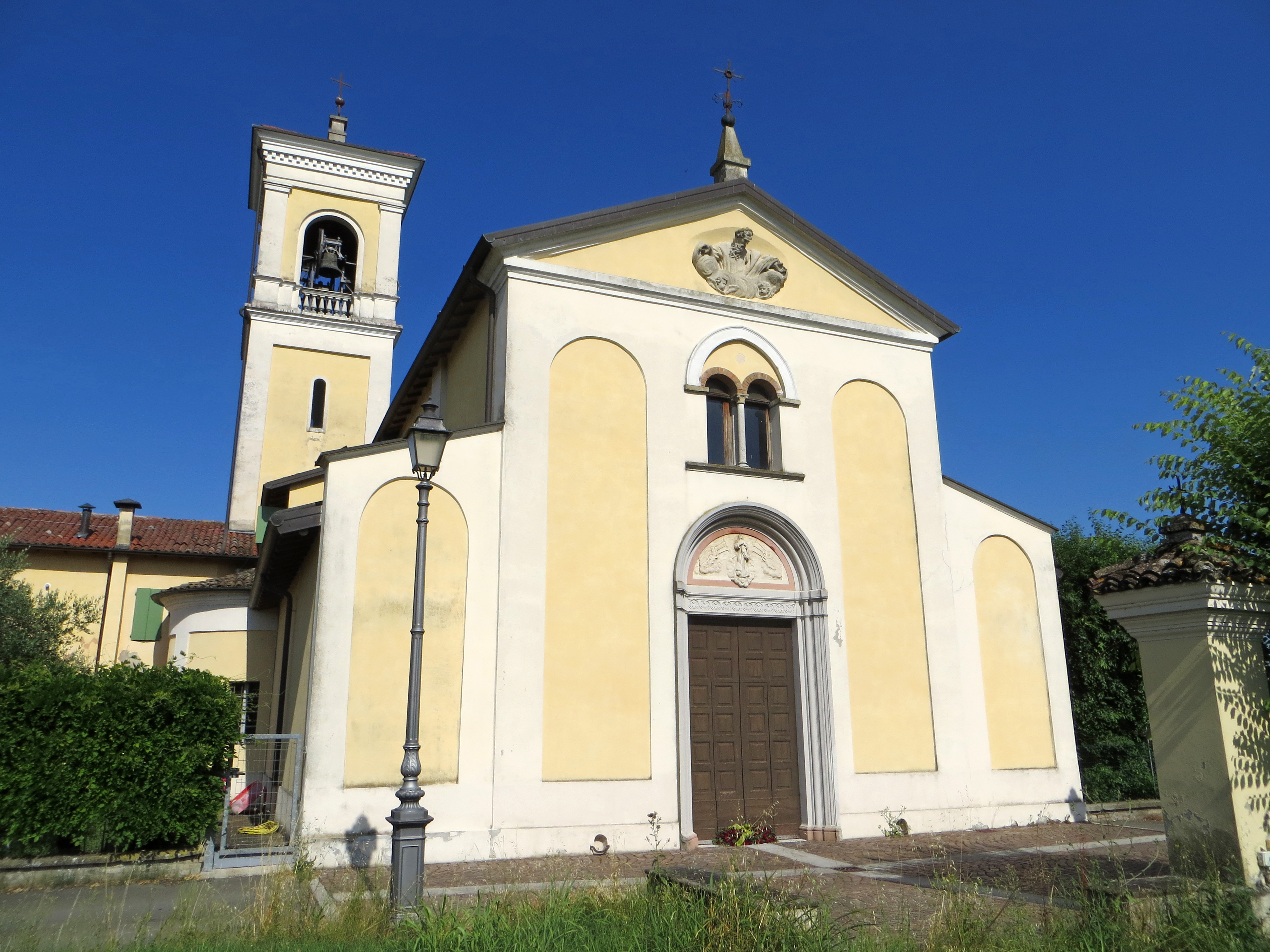 Chiesa dell'Assunzione di Maria Vergine (Valera, Parma) - facciata